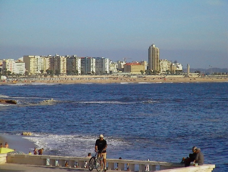 Praia da Figueira da Foz, Figueira da Foz - Portugal.